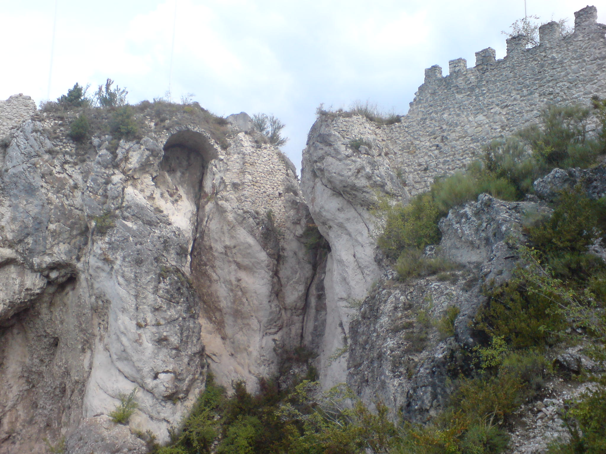 Ruines du château de Rougon